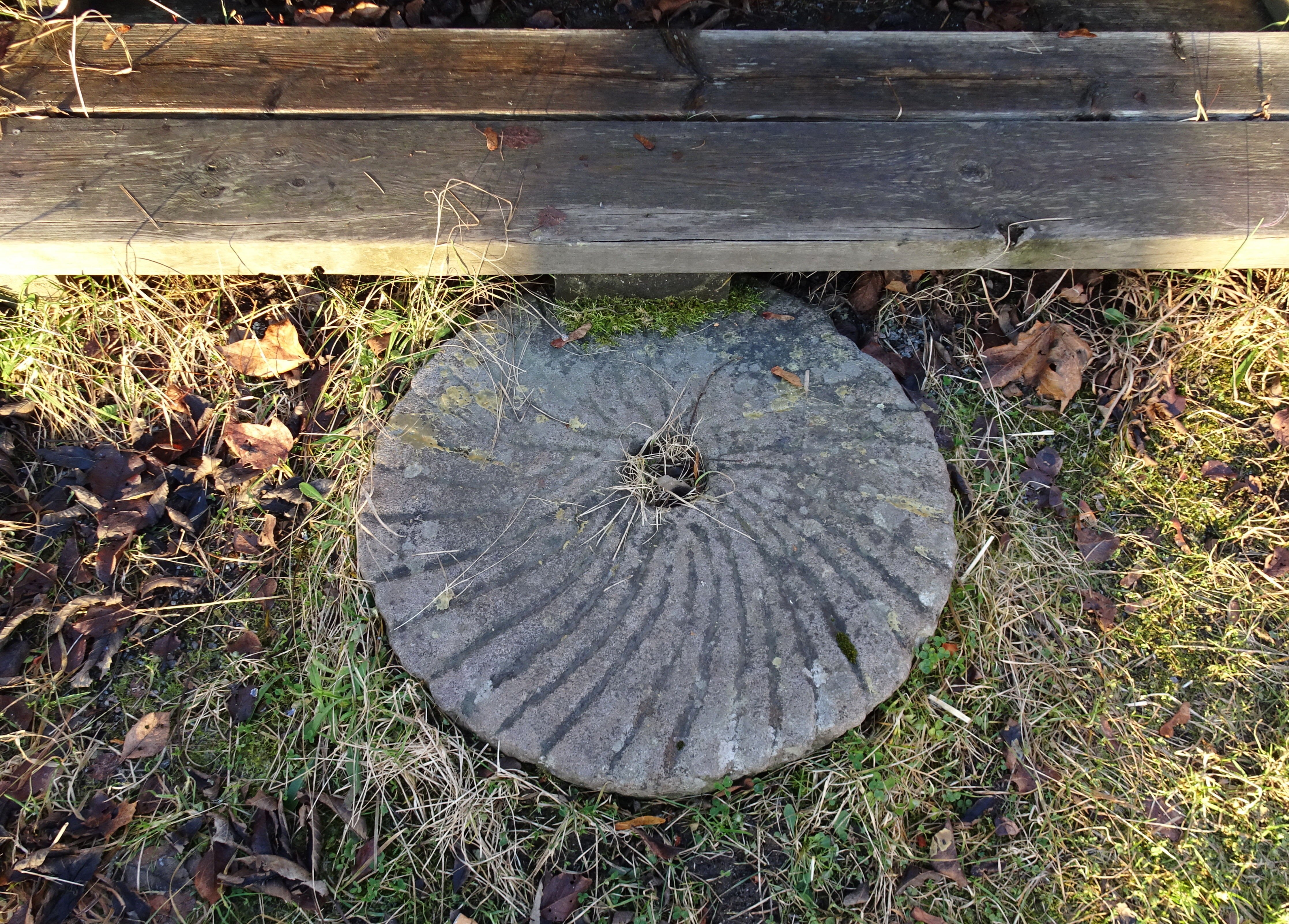 Neglinge gård, kvarnsten framför entretrappan